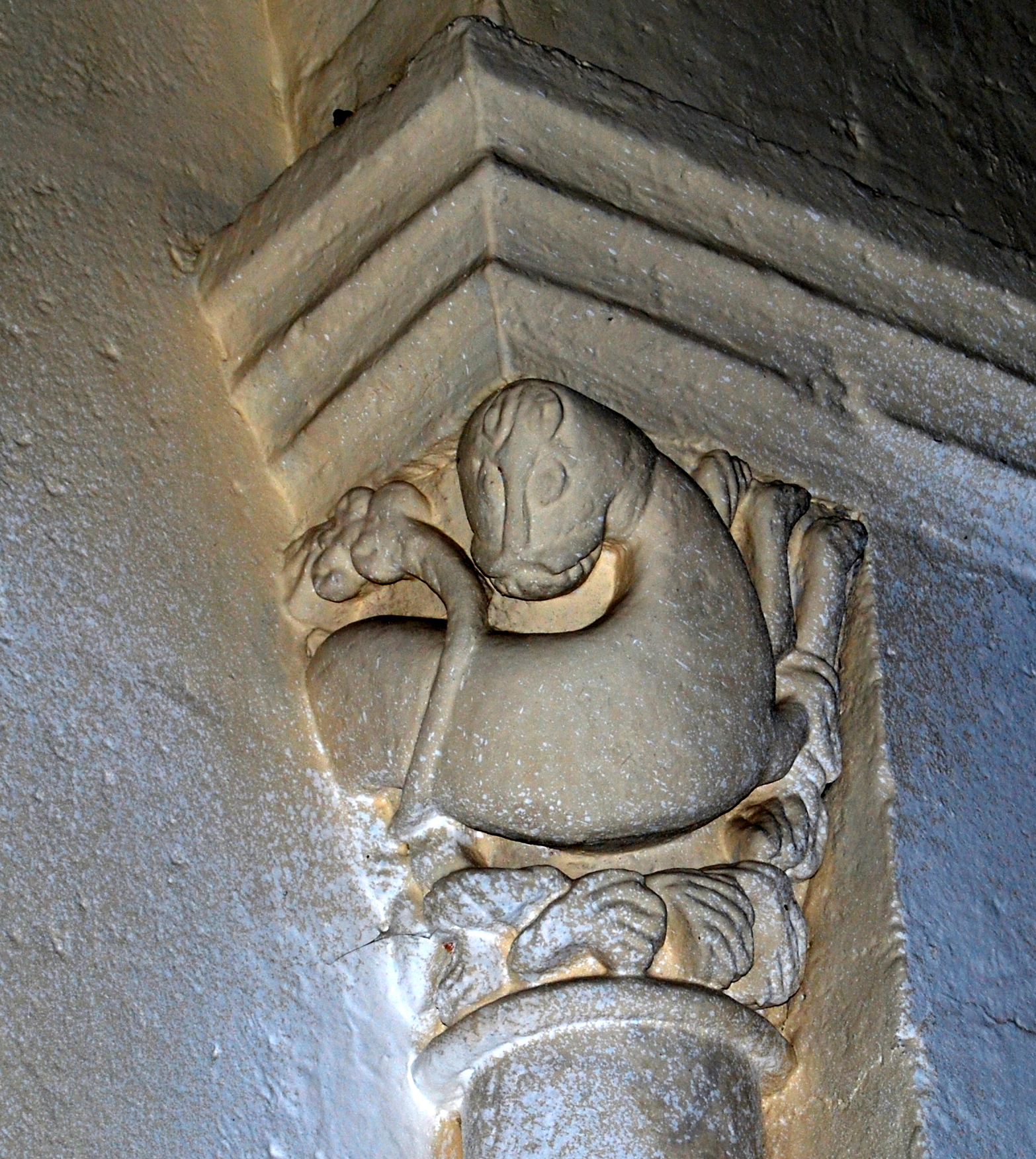 Chapiteaux de l'église Notre-Dame de Lestiac-sur-Garonne